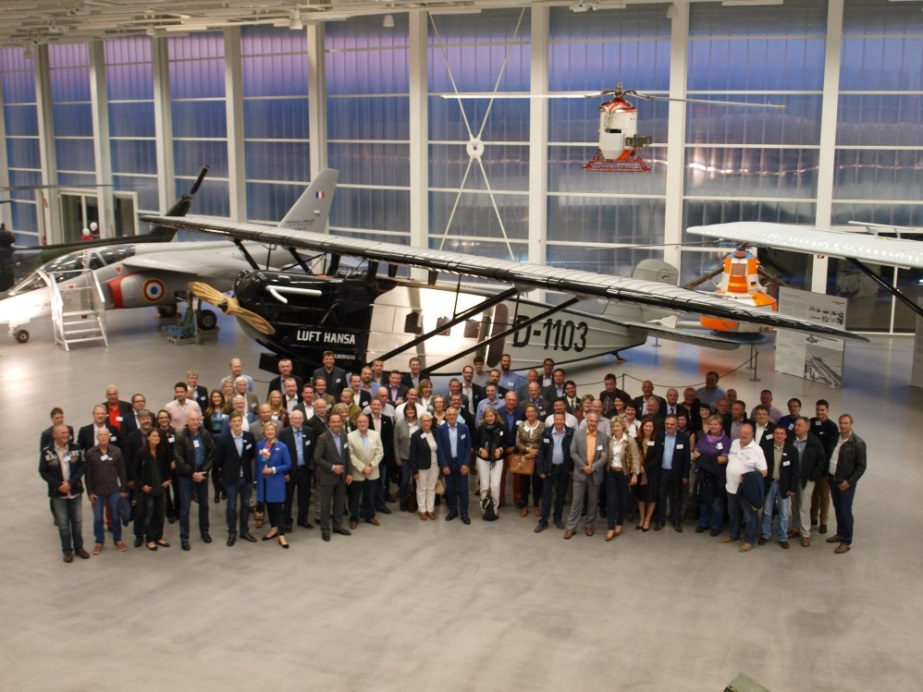 VDFU-Sommertreffen 2014